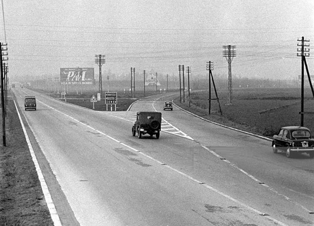 Varese－Como間のアウトストラーダ・デル・ラージ